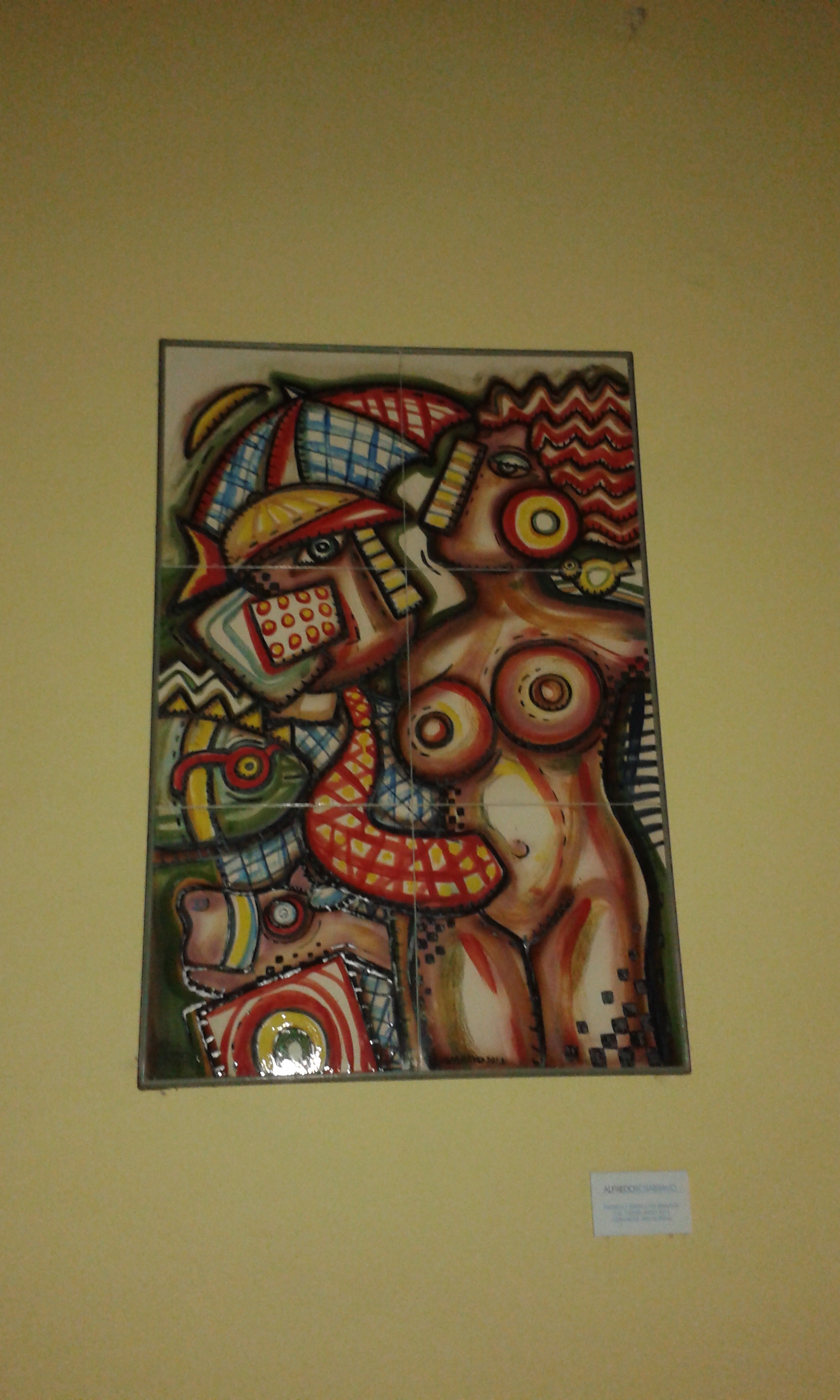 Pannelli ceramici presenti nella frazione di Ellera This is a photo of a monument which is part of cultural heritage of Italy.